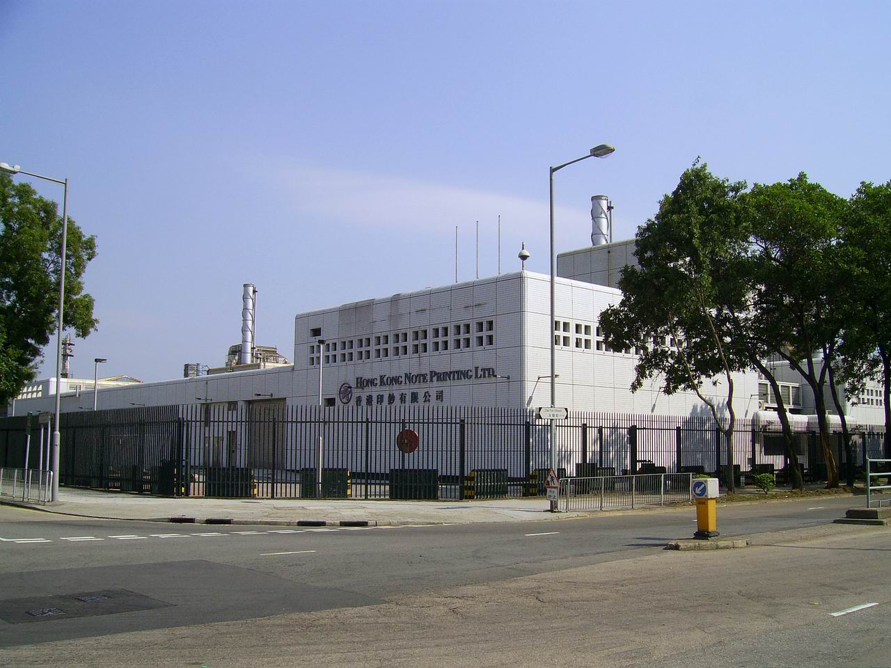 香港印鈔